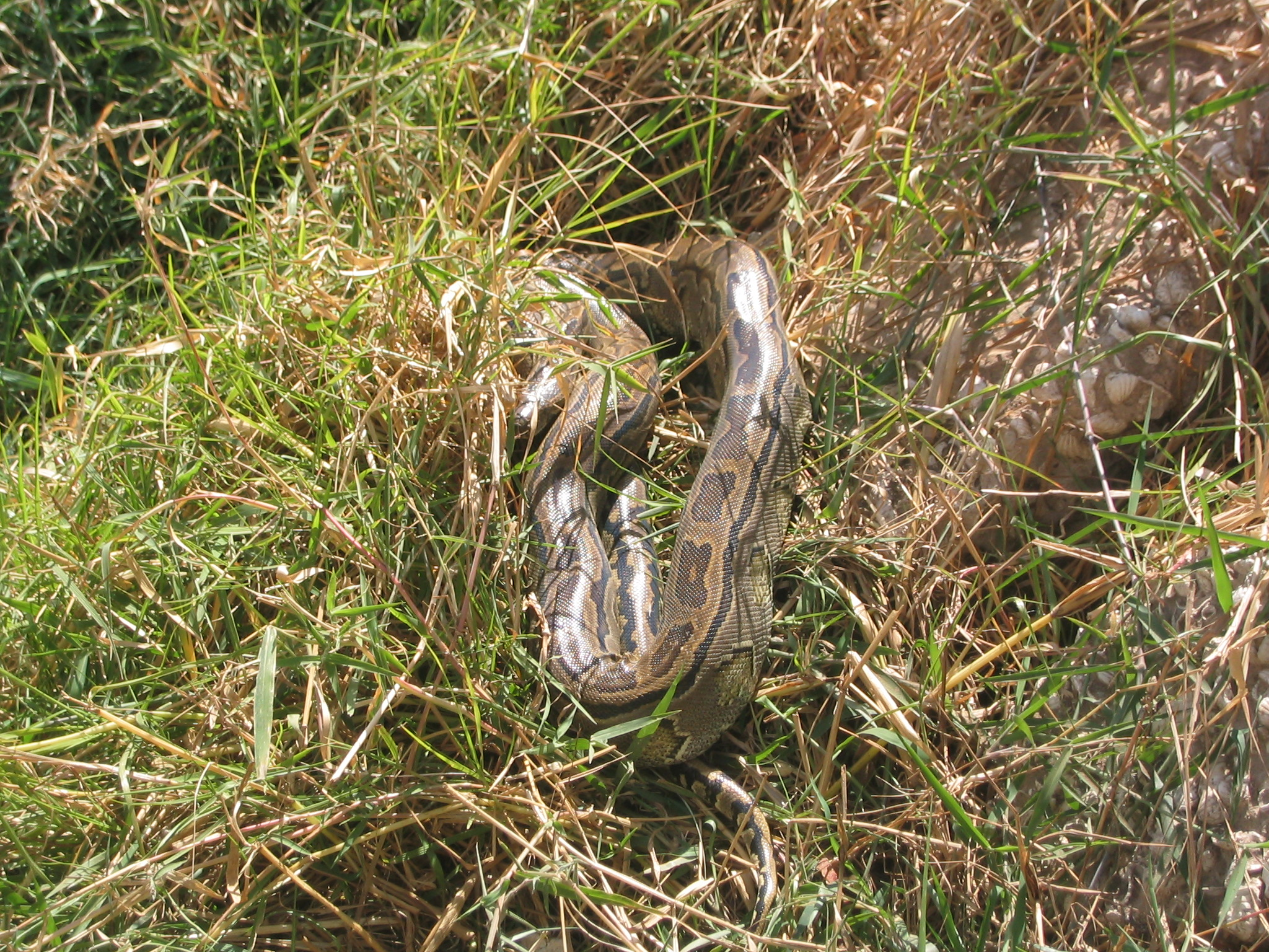 Python au Parc National du Djoudj (Sénégal)